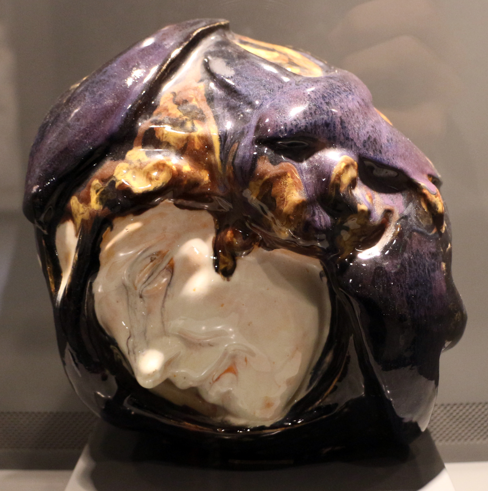 Il parco e i musei di Nervi This is a photo of a monument which is part of cultural heritage of Italy.